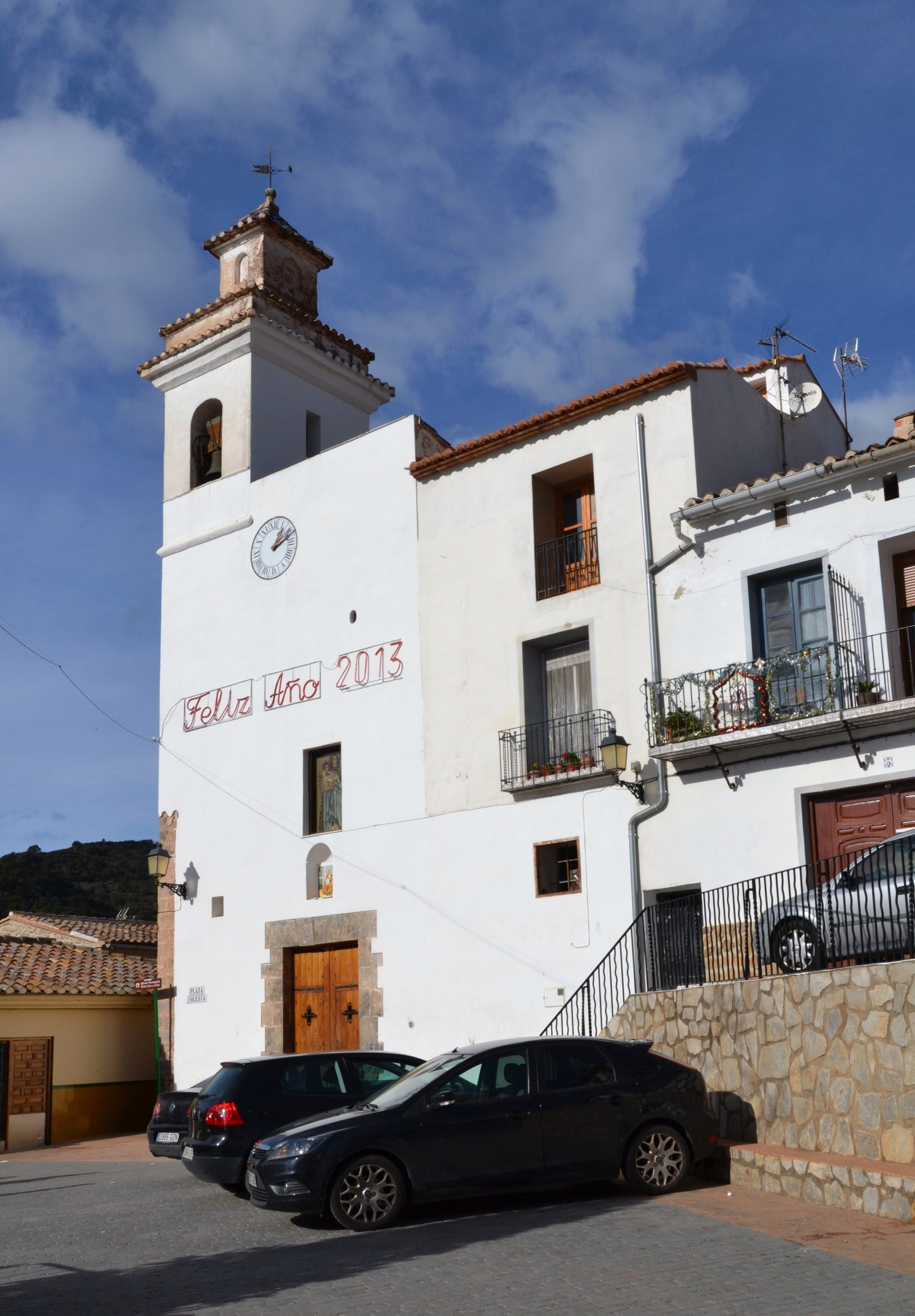 Xóvar, església de santa Anna.